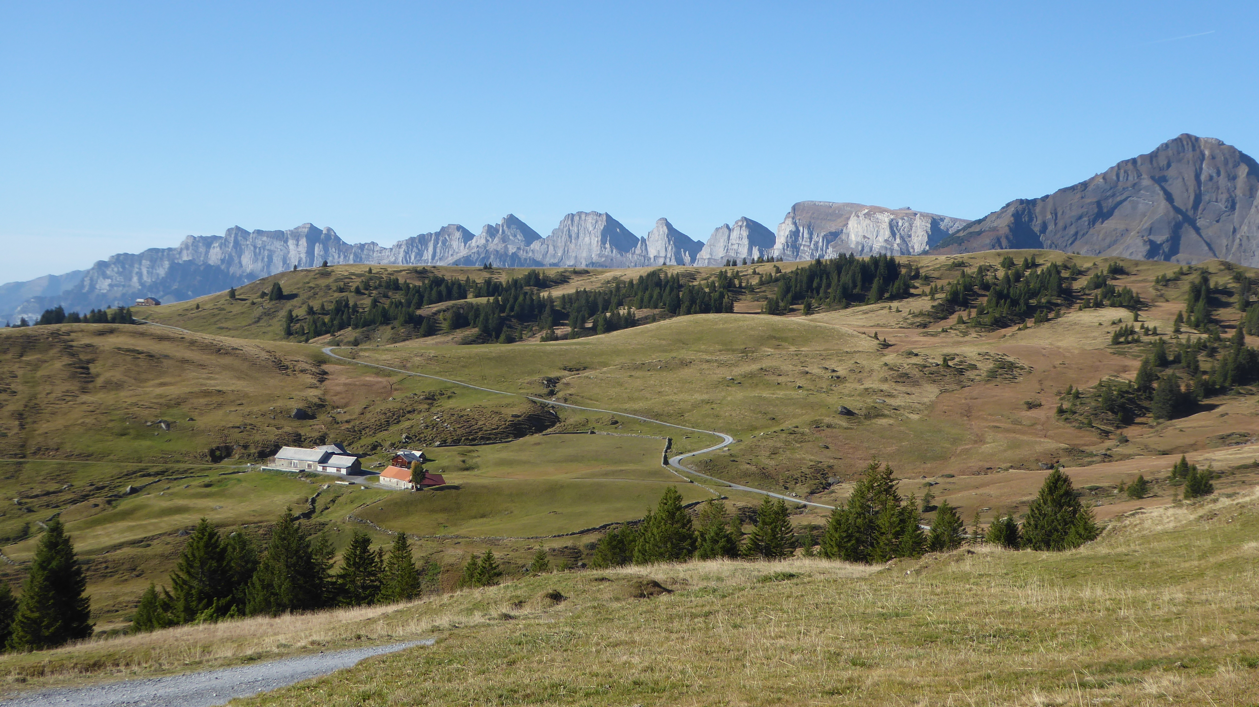 Alp Althaus auf Palfries mit Churfirsten